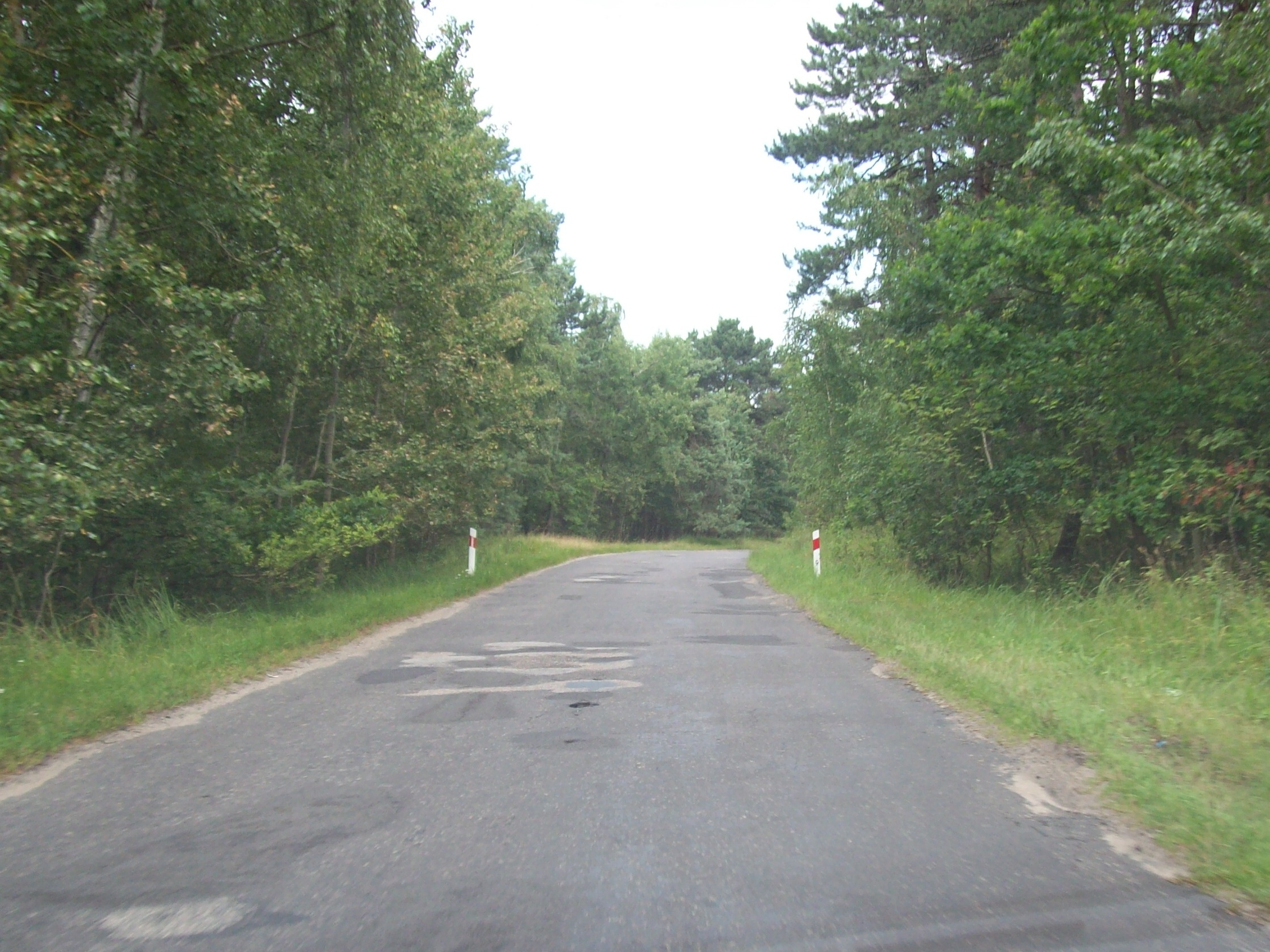 DW 501 Krynica Morska - Piaski